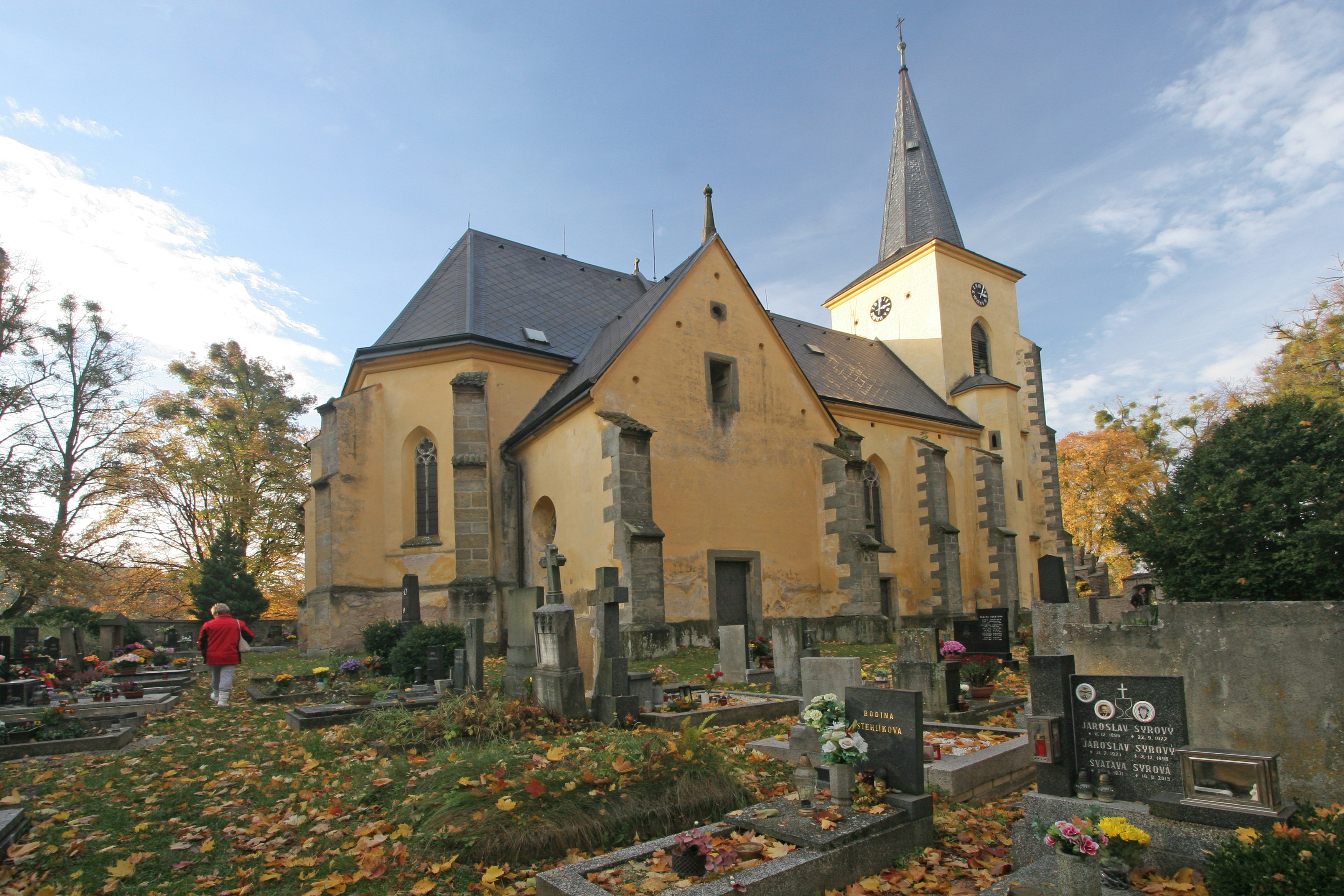 Kostel sv. Petra a Pavla (Kostelec u Heřmanova Městce), Kostelec u Heřmanova Městce